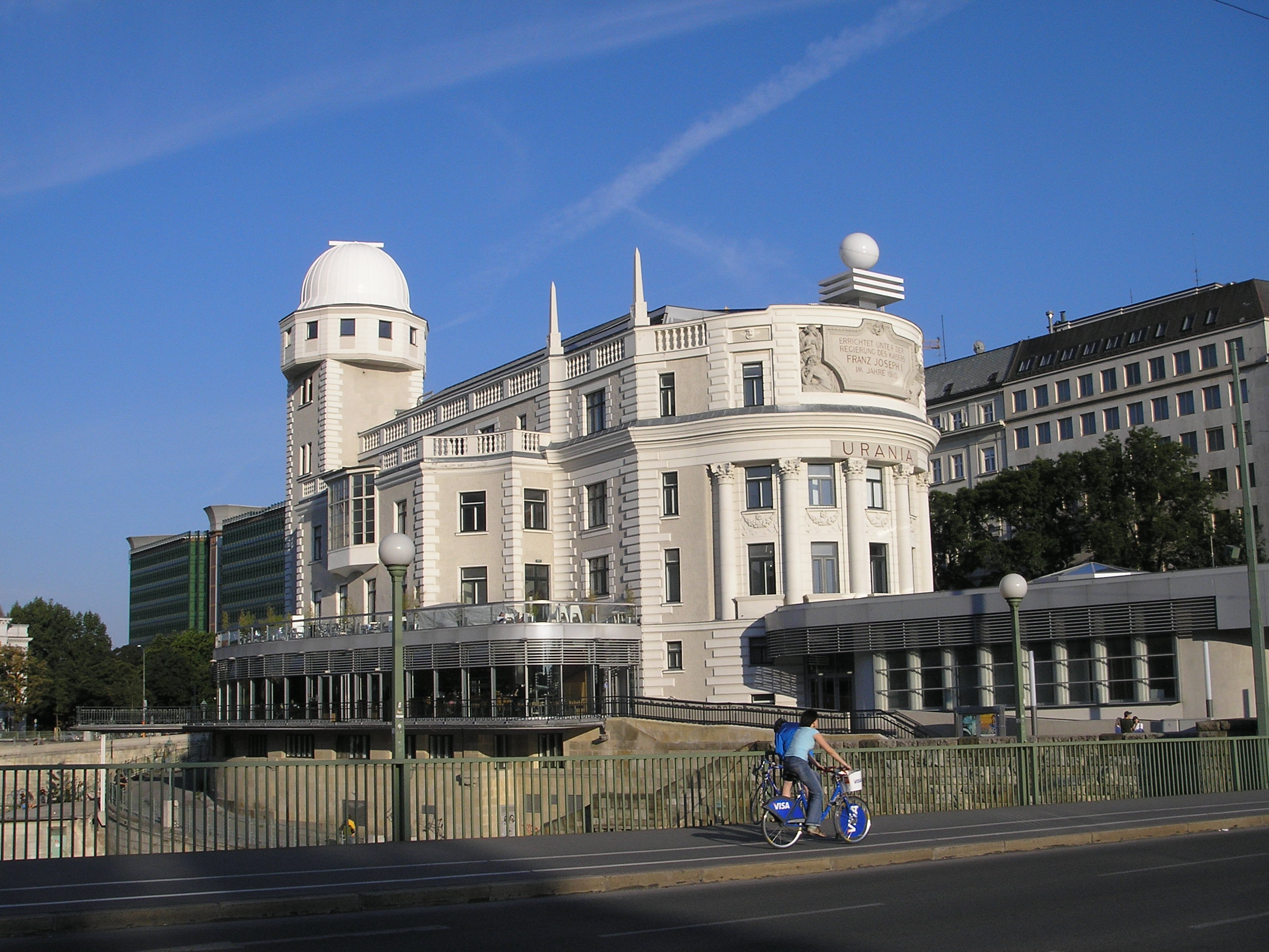 Urania in Vienna